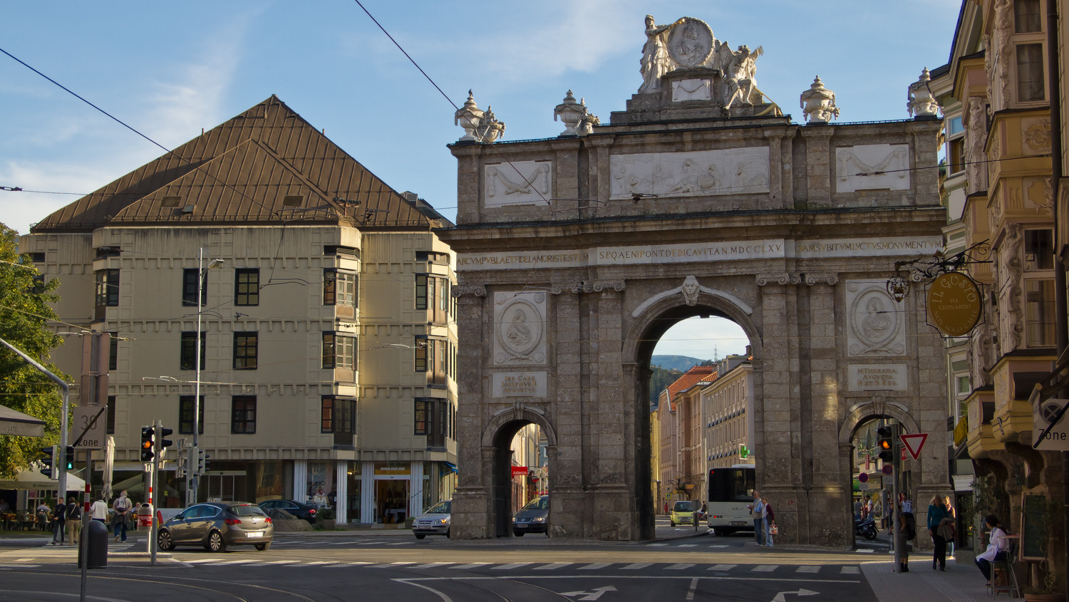 Die Triumphpforte von der Maria-Theresien-Straße aus nördlicher Richtung (Blickrichtung Süd) fotografiert.